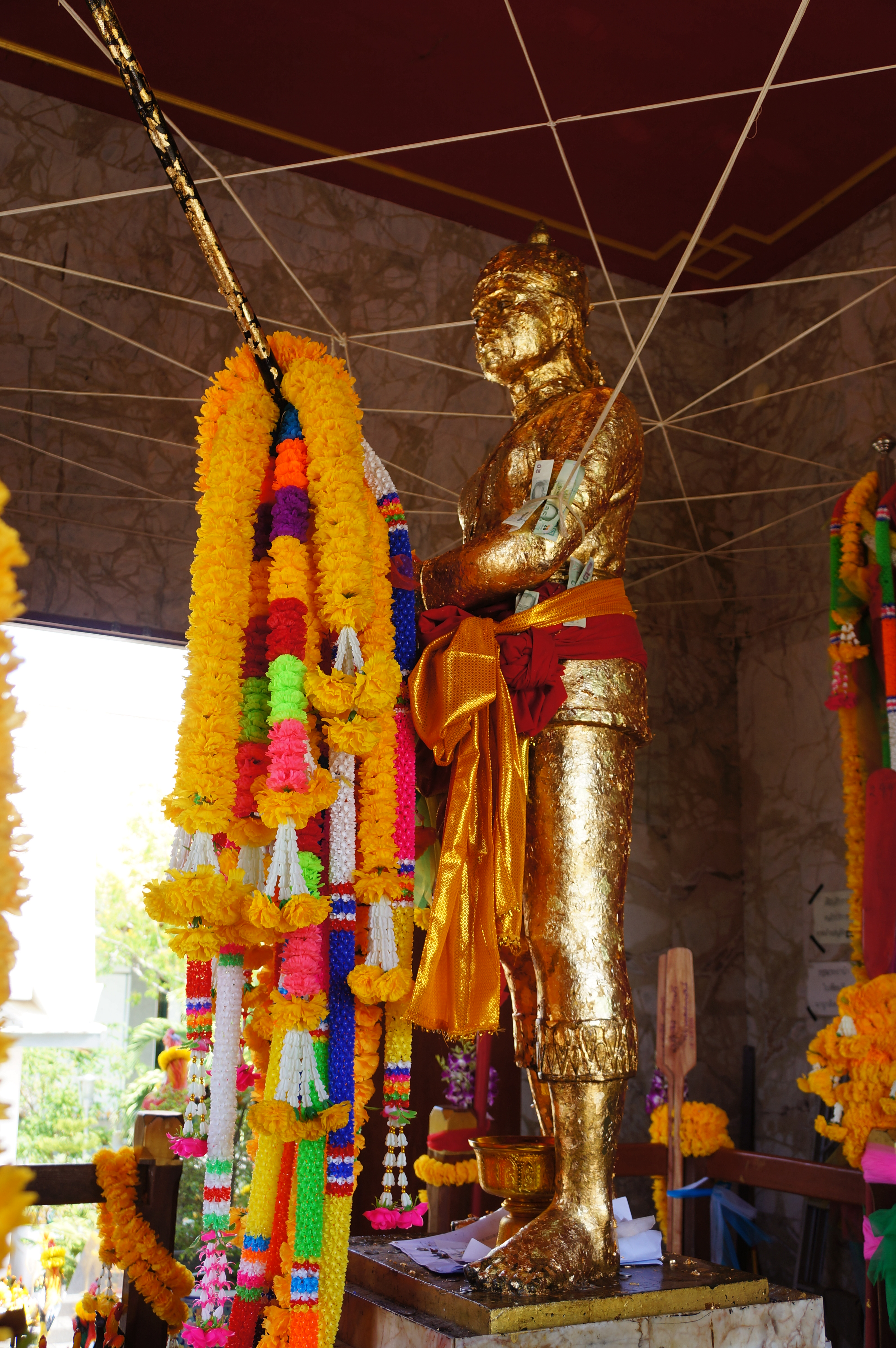 ศาลพันท้ายนรสิงห์ เป็นอนุสาวรีย์แห่งความซื่อสัตย์ รักษากฎระเบียบ กฎมณเฑียรบาลยิ่งกว่าชีวิตตน ตั้งอยู่ที่บ้านพันท้ายนรสิงห์ ตำบลพันท้ายนรสิงห์ อำเภอเมืองสมุทรสาคร จังหวัดสมุทรสาคร ศาลพันท้ายนรสิงห์ถูกประกาศขึ้นทะเบียนเป็นโบราณสถานของชาติ ในราชกิจจานุเบกษา เล่ม 72 ตอนที่ 2 เมื่อวันที่ 4 มกราคม พ.ศ. 2498 กรมศิลปากรได้ดำเนินการจัดสร้างศาลพันท้ายนรสิงห์ขึ้น อยู่ถัดจากศาลเก่าที่พังลงมาไม่มากนัก โดยกันอาณาบริเวณรอบ ๆ ศาลไว้ประมาณ 100 ไร่ เพื่อจัดตั้งเป็น "อุทยานพันท้ายนรสิงห์" ภายในศาลมีรูปปั้นของพันท้ายนรสิงห์ขนาดเท่าของจริงในท่าถือท้ายคัดเรือ